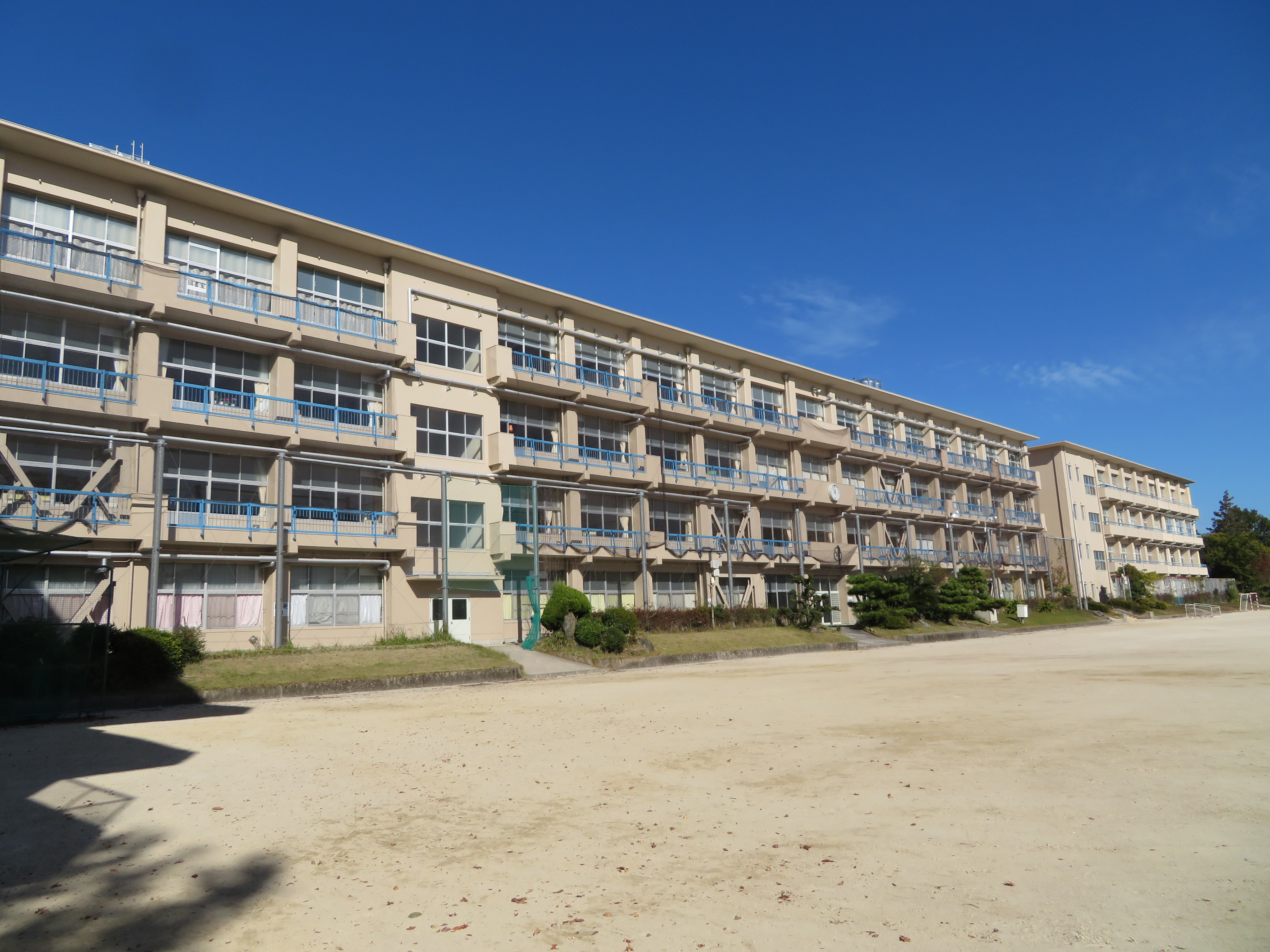 岡崎市立葵中学校（岡崎市伊賀新町）